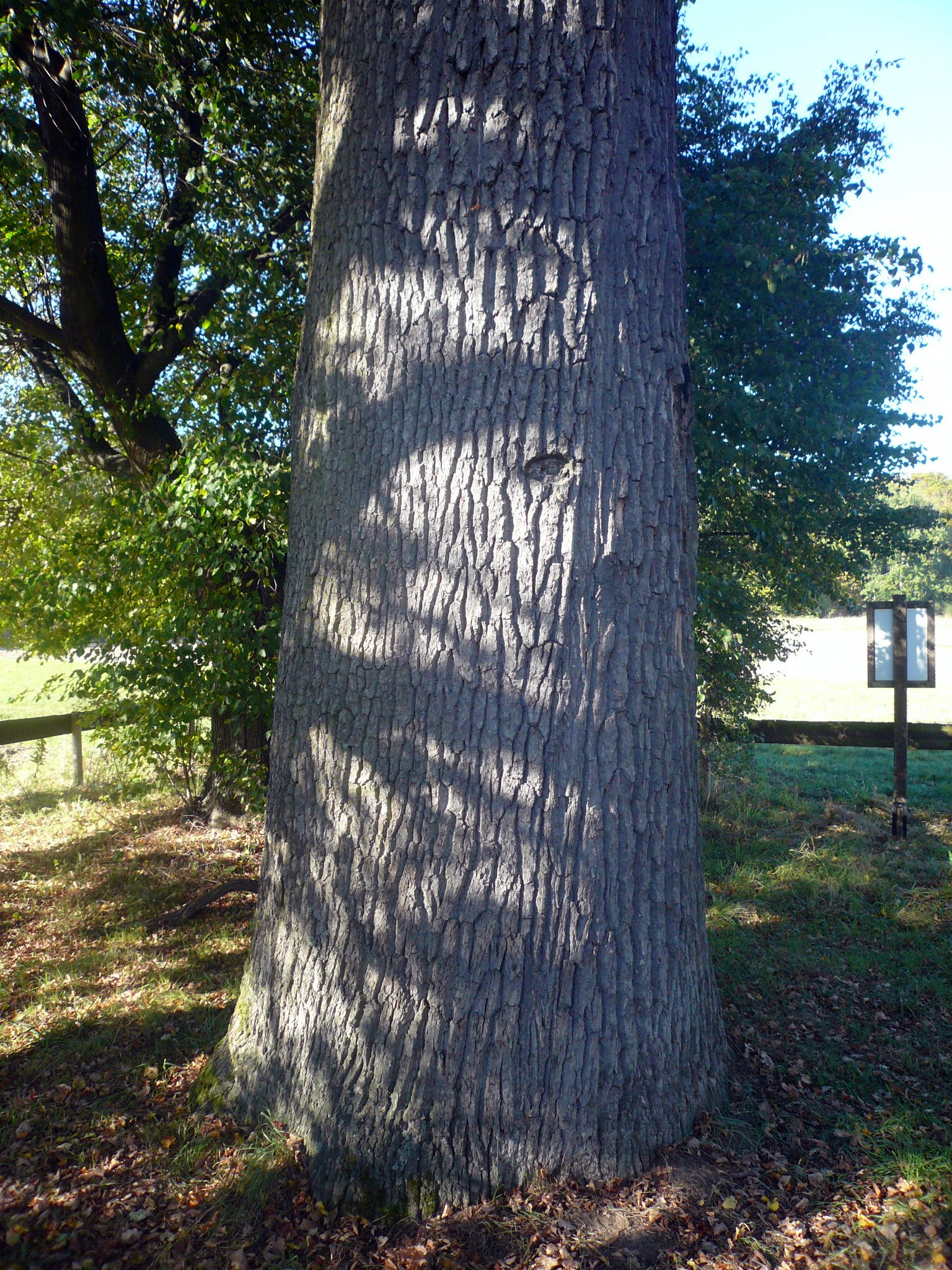 Schöne Eiche